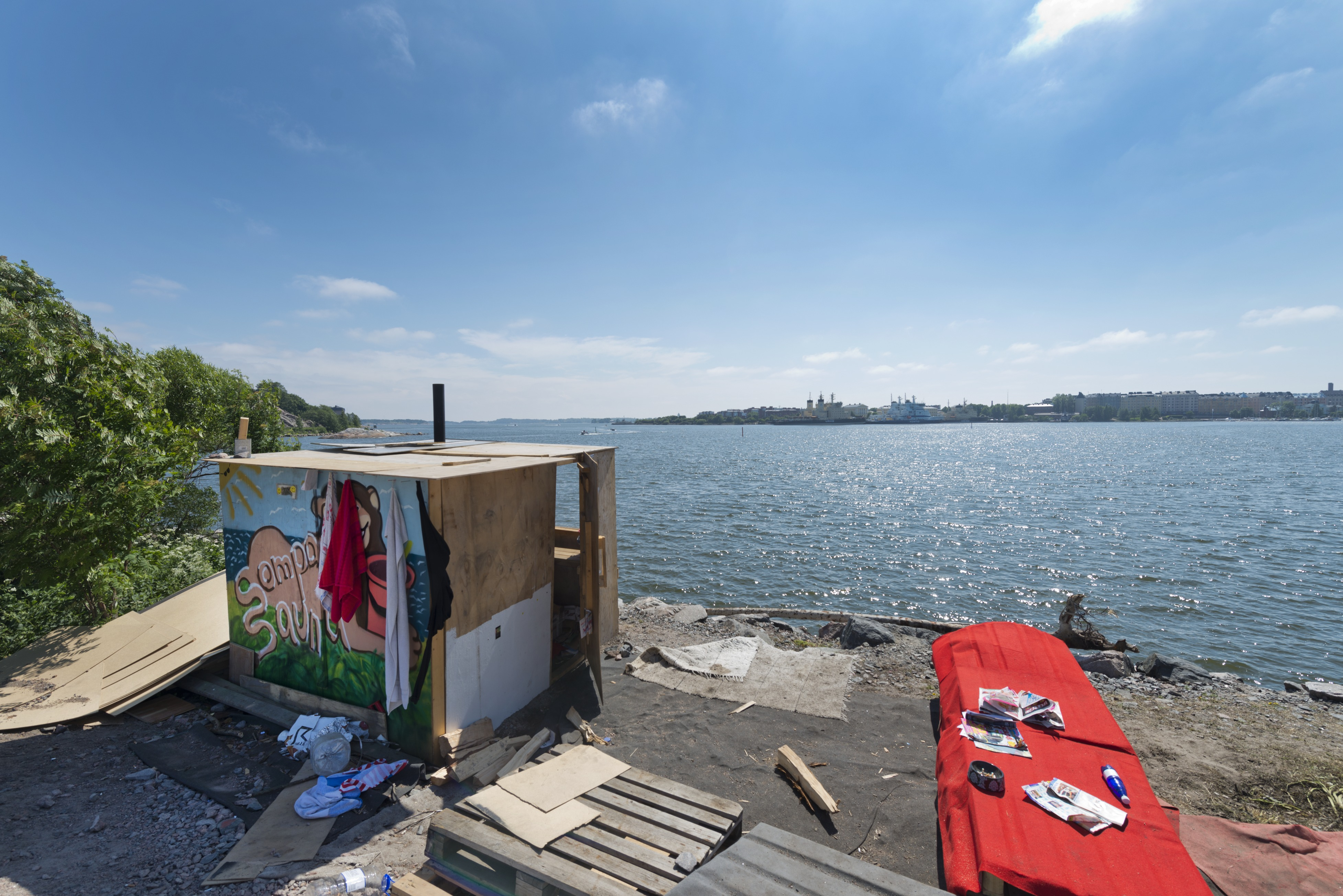 Sompasauna vuonna 2013